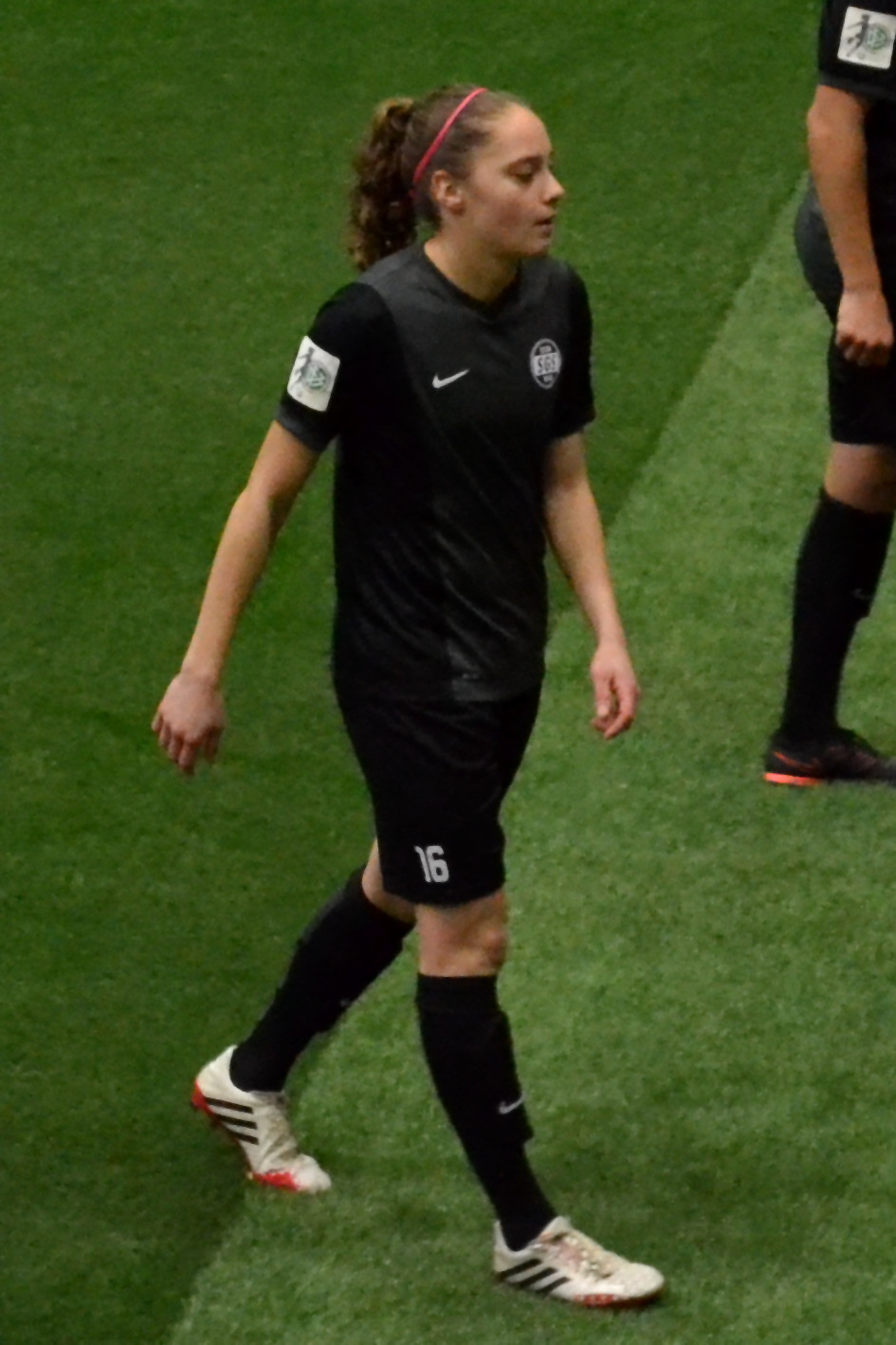 Jacqueline Klasen (SGS Essen) beim SAP Frauen-FußballCup 2016